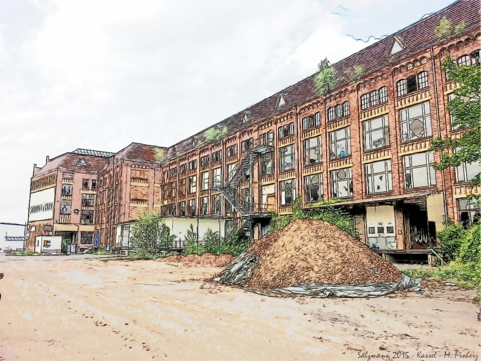 Salzmann & COMP.